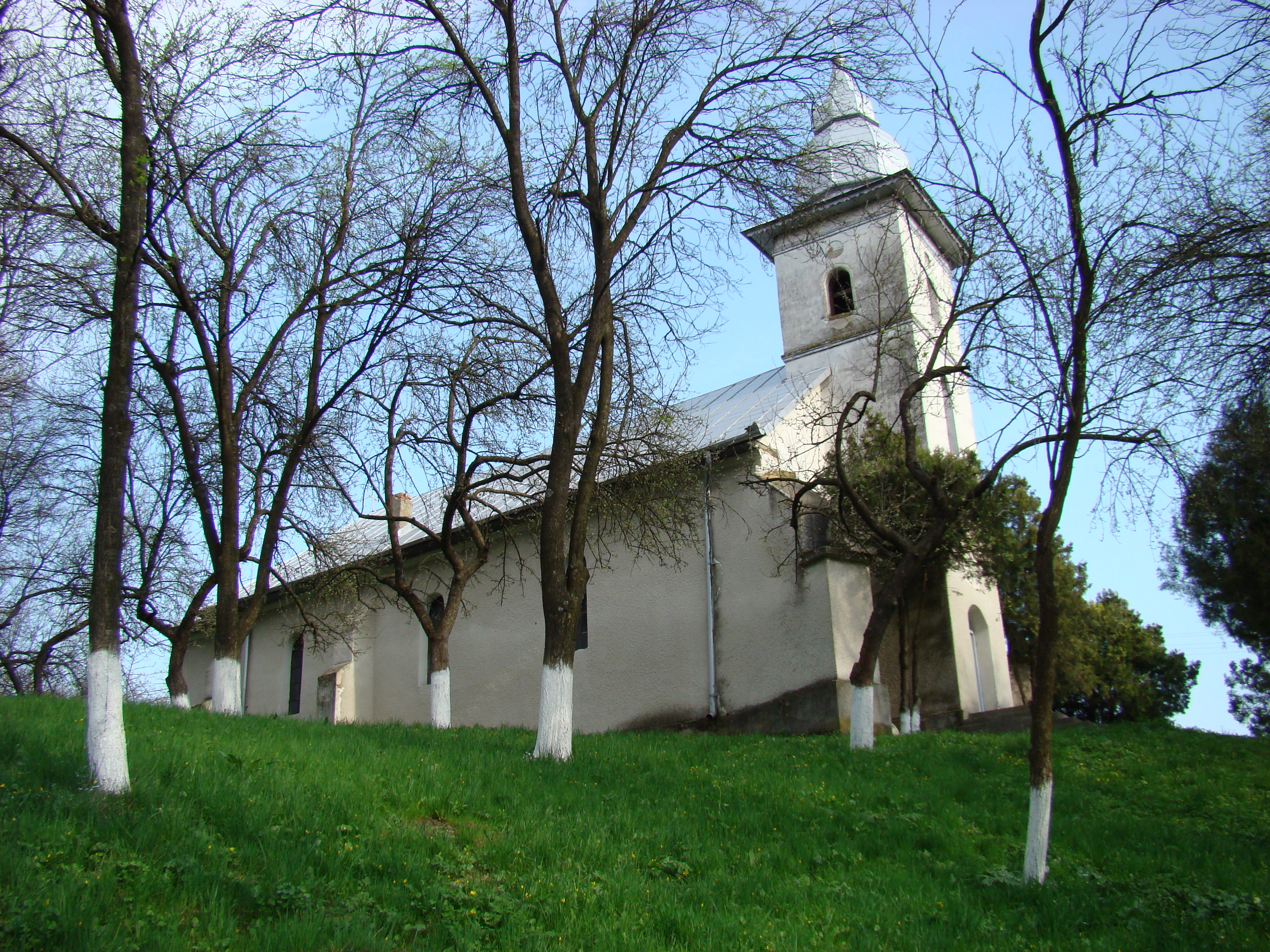 Tioltur, Cluj